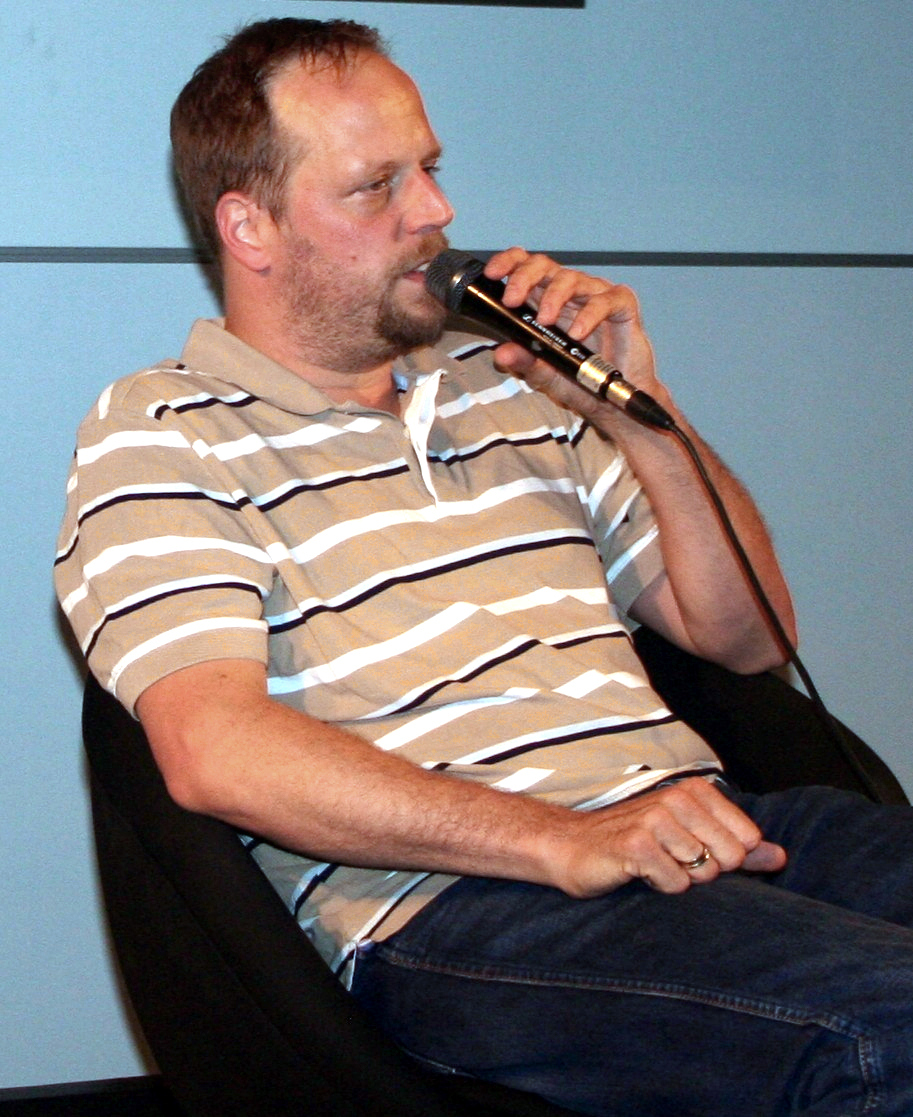 Smudo in der Mannheimer Popakademie zu Gast in der Diskussions-Reihe "Open.House"